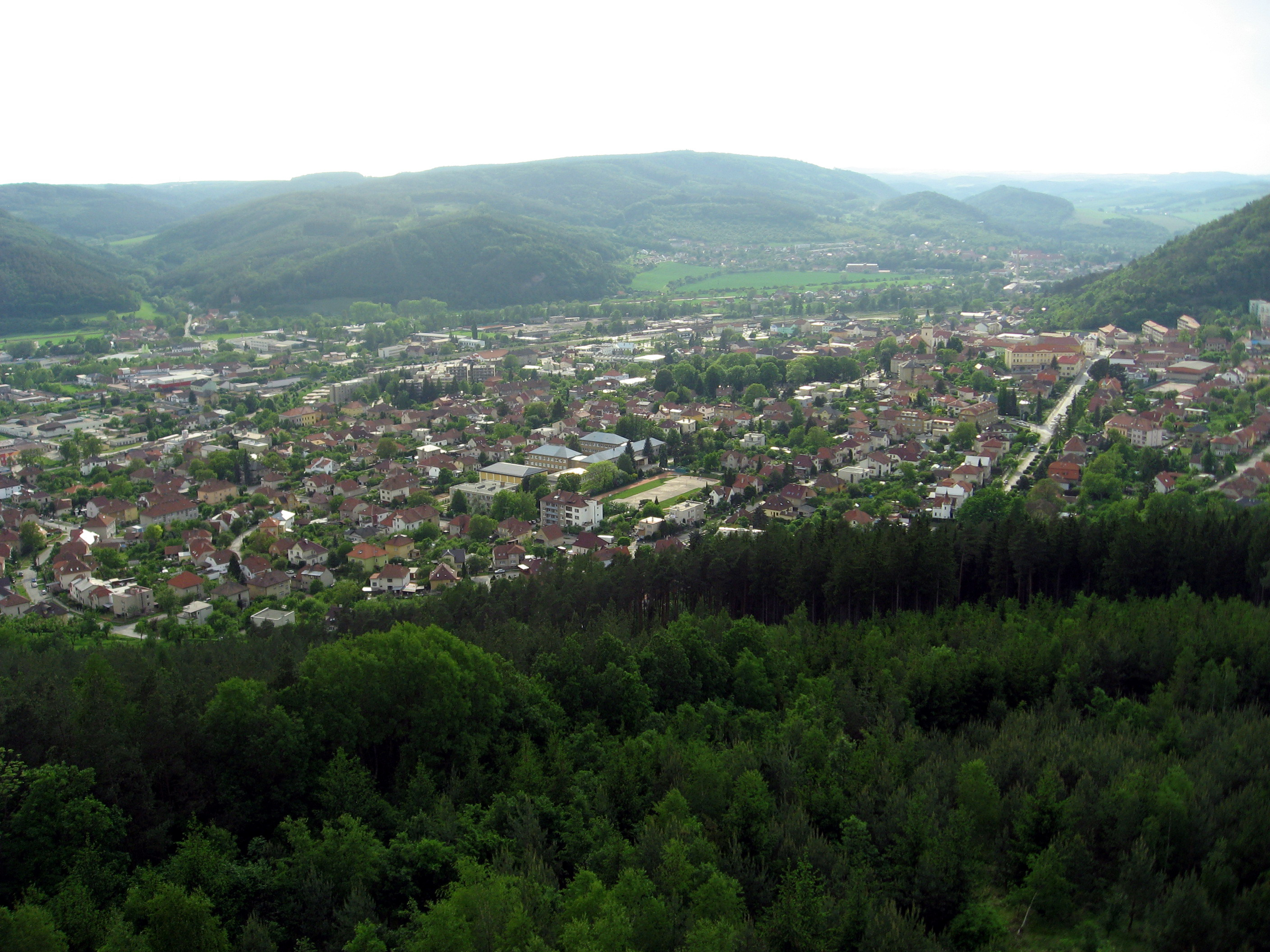 Tišnov z Klucaniny